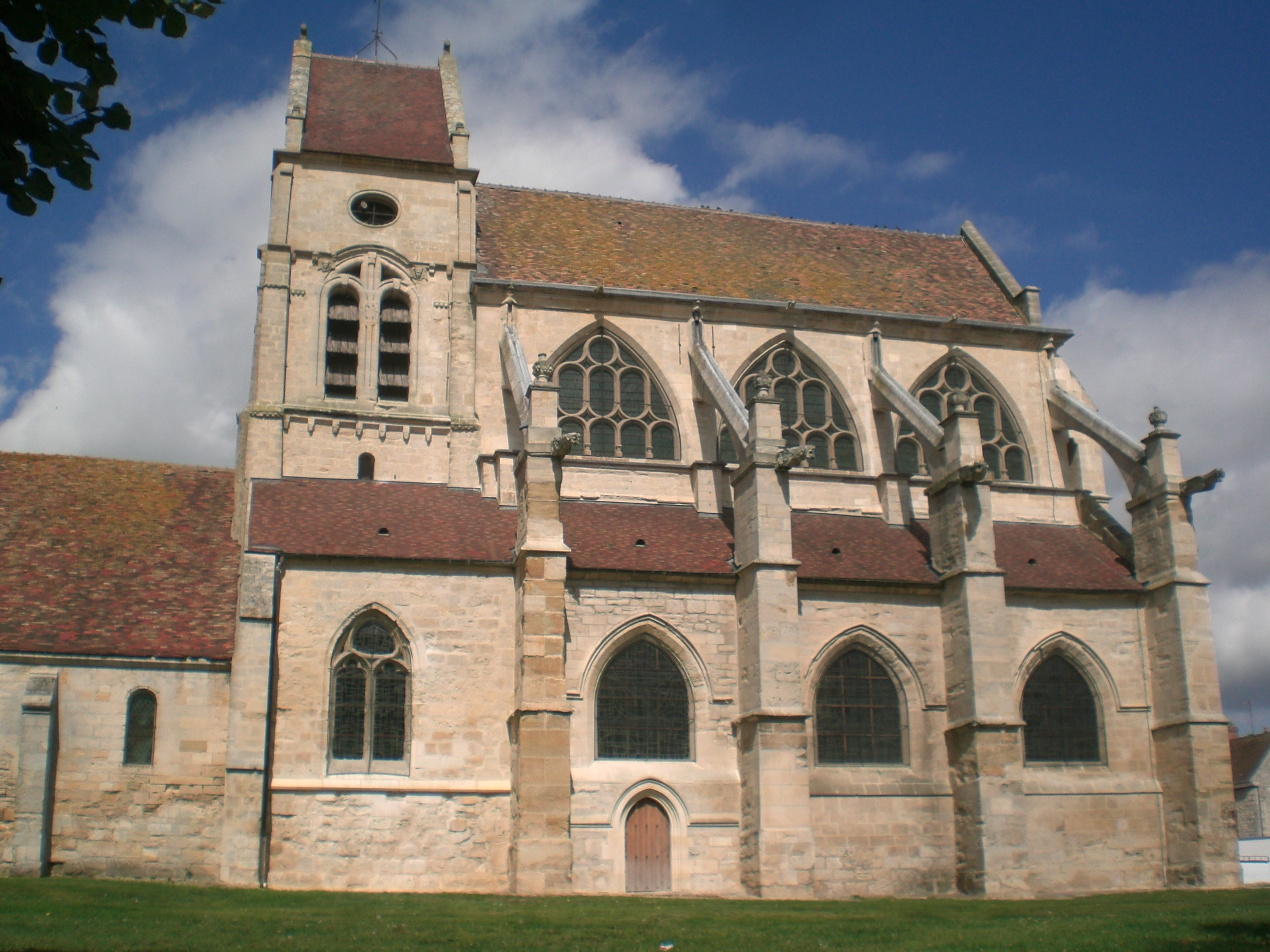 eglise de Cormeilles-en-Vexin